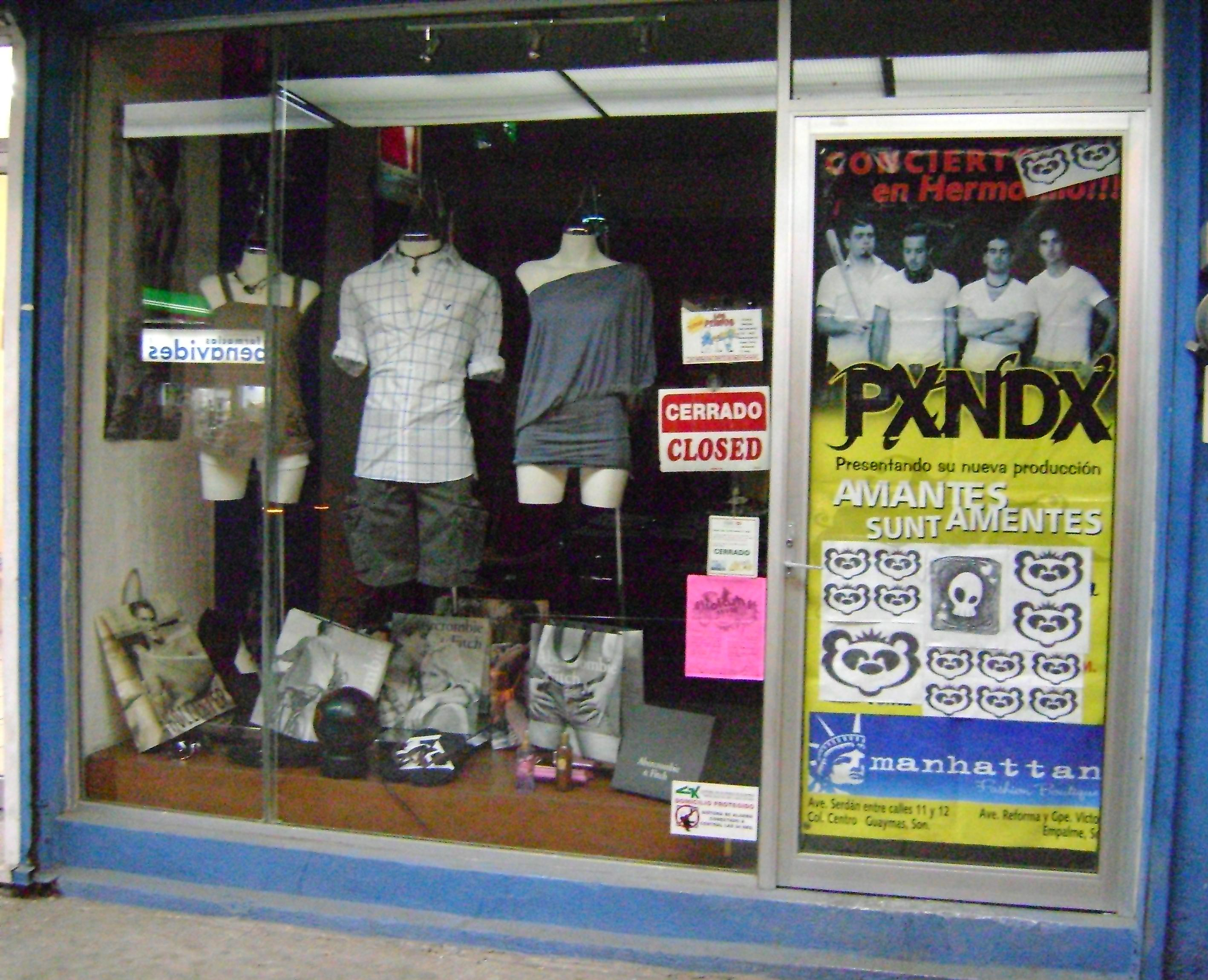 Poster de un concierto de la banda mexicana Panda en la ciudad de Hermosillo Sonora (fotografía tomada en Guaymas Sonora). Concierto organizado por CACTUS ENT. (Creadores de Desierto Urbano)